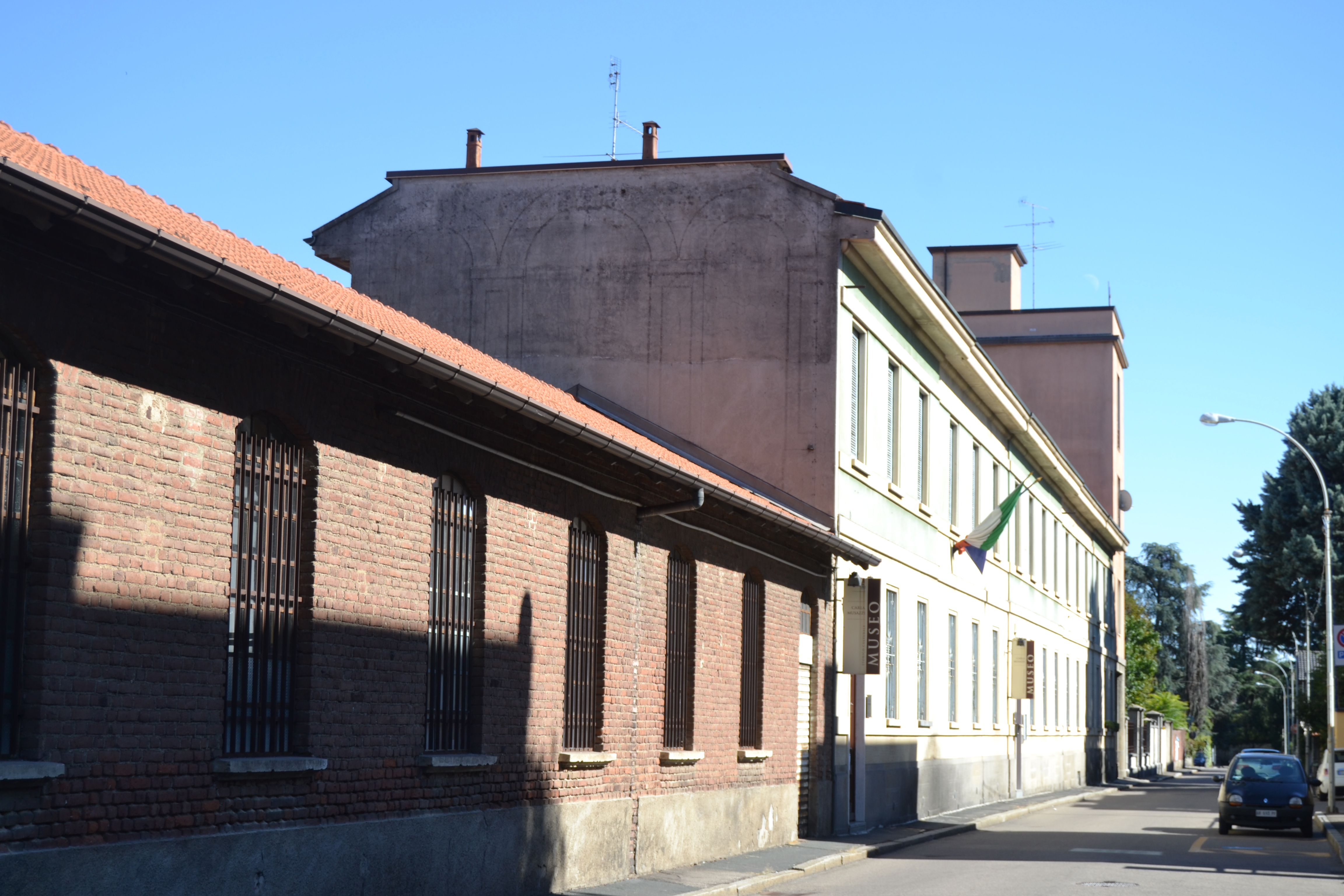 Museo storico culturale Carla Musazzi This is a photo of a monument which is part of cultural heritage of Italy.